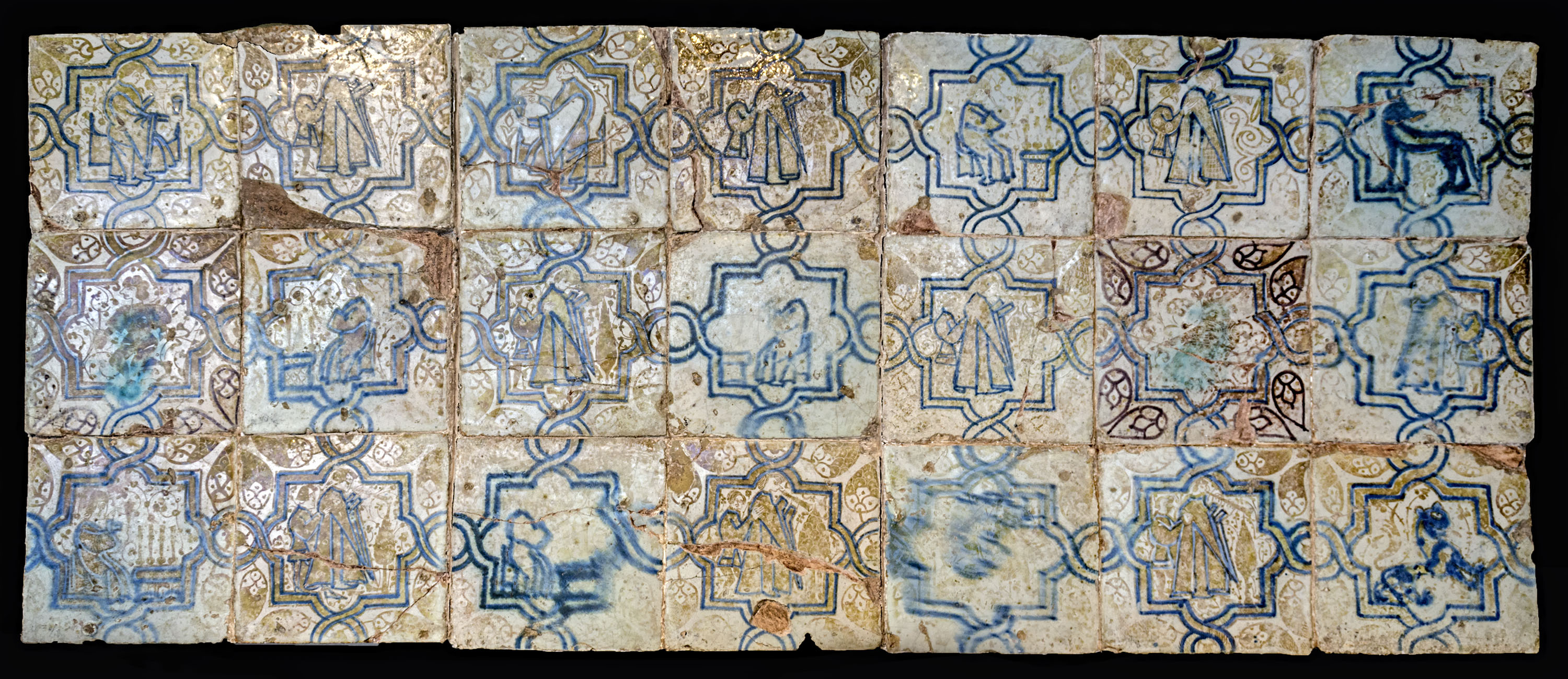 Museo Arqueológico y Etnológico de Córdoba (España).